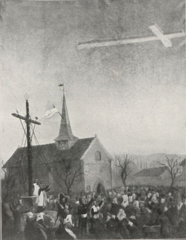 Apparition d'une croix le 17 décembre 1826 à Migné-Auxances (86). Titre : La Croix miraculeuse apparue à Migné en 1826 / par le chanoine Alphonse Bleau] Auteur : Bleau, Alphonse. Auteur du texte Éditeur : Société française d'imprimerie et de librairie (Poitiers) Date d'édition : 1908 Sujet : Migné (France) Type : monographie imprimée Langue : français Format : 1 vol. (VIII-162 p.) : pl. ; in-18 Format : Nombre total de vues : 186 Description : Collection numérique : Fonds régional : Poitou-Charentes Description : Contient une table des matières Description : Avec mode texte Droits : domaine public Identifiant : ark:/12148/bpt6k97076490 Titre : La Croix miraculeuse apparue à Migné en 1826 / par le chanoine Alphonse Bleau] Auteur : Bleau, Alphonse. Auteur du texte Éditeur : Société française d'imprimerie et de librairie (Poitiers) Date d'édition : 1908 Sujet : Migné (France) Type : monographie imprimée Langue : français Format : 1 vol. (VIII-162 p.) : pl. ; in-18 Format : Nombre total de vues : 186 Description : Collection numérique : Fonds régional : Poitou-Charentes Description : Contient une table des matières Description : Avec mode texte Droits : domaine public Identifiant : ark:/12148/bpt6k97076490 Source : Bibliothèques de l'Université de Poitiers, 2016-107602 Notice du catalogue : Provenance : Bibliothèque nationale de France Date de mise en ligne : 27/06/2016 Source : Bibliothèques de l'Université de Poitiers, 2016-107602 Notice du catalogue : Provenance : Bibliothèque nationale de France Date de mise en ligne : 27/06/2016